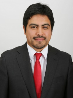 Daniel Alexander Melo Contreras